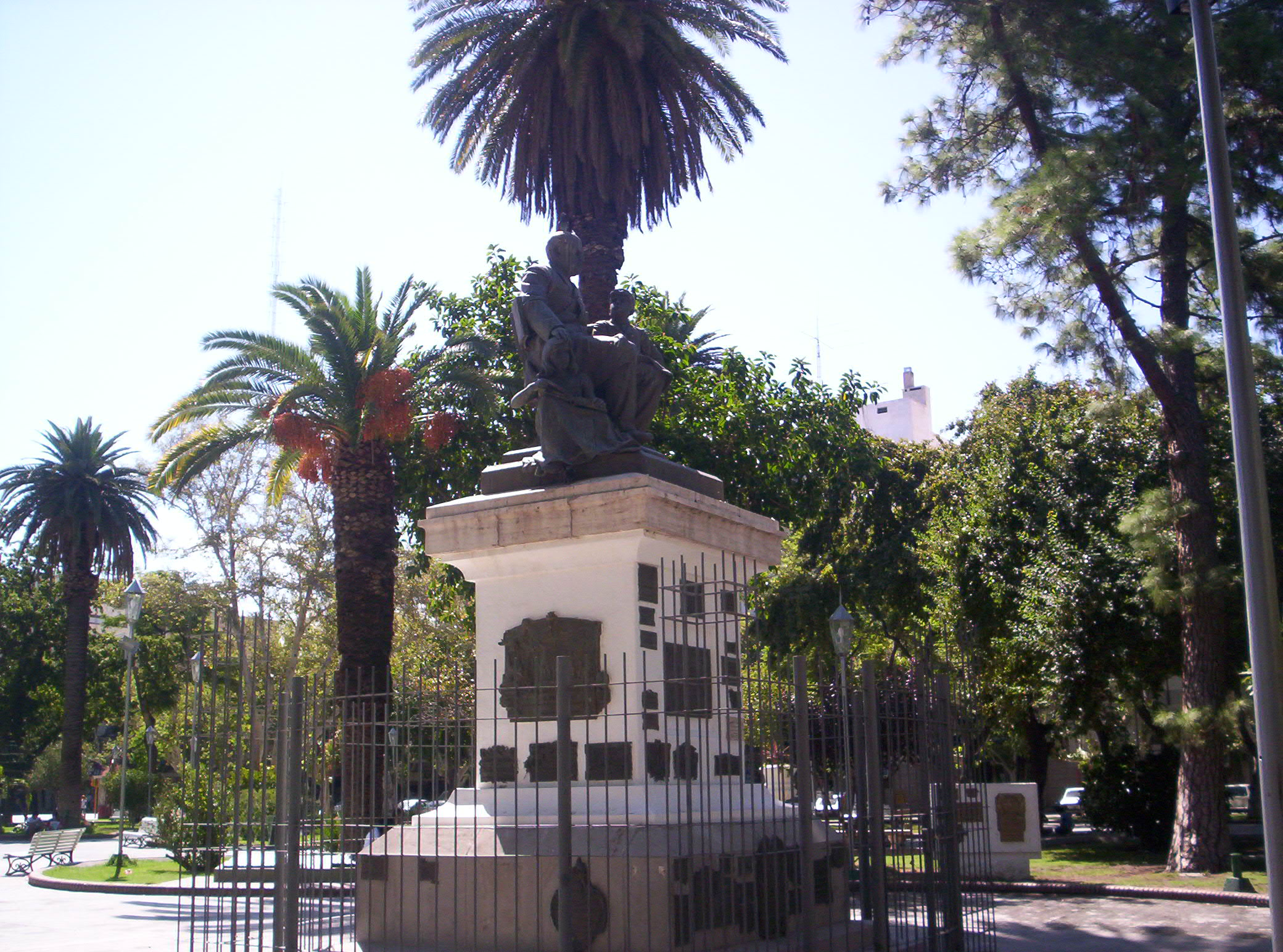 Fotografía que muestra un monumento de Domingo Faustino Sarmiento en la ciudad de San Juan Argentina, donde el nació el 11 de septiembre de 1811. Domingo Faustino Sarmiento (15 de febrero de 1811 Ciudad de San Juan, Argentina- 11 de septiembre de 1888 Asunción, Paraguay)